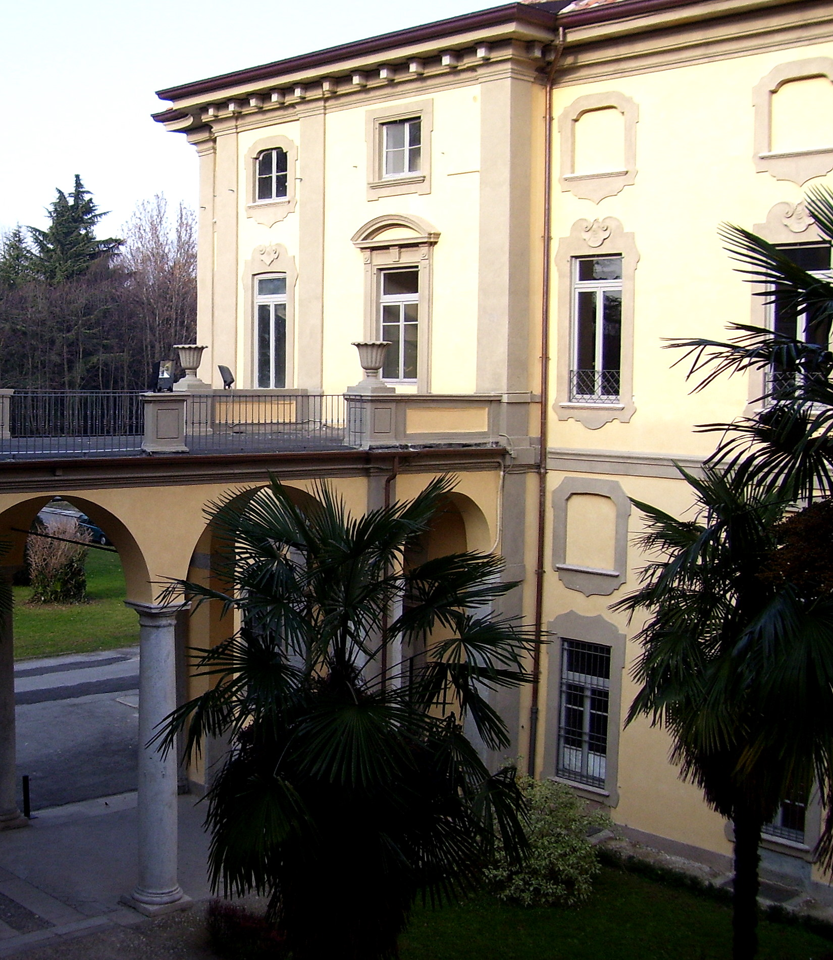 Ingresso della settecentesca Villa Pusterla (Limbiate).